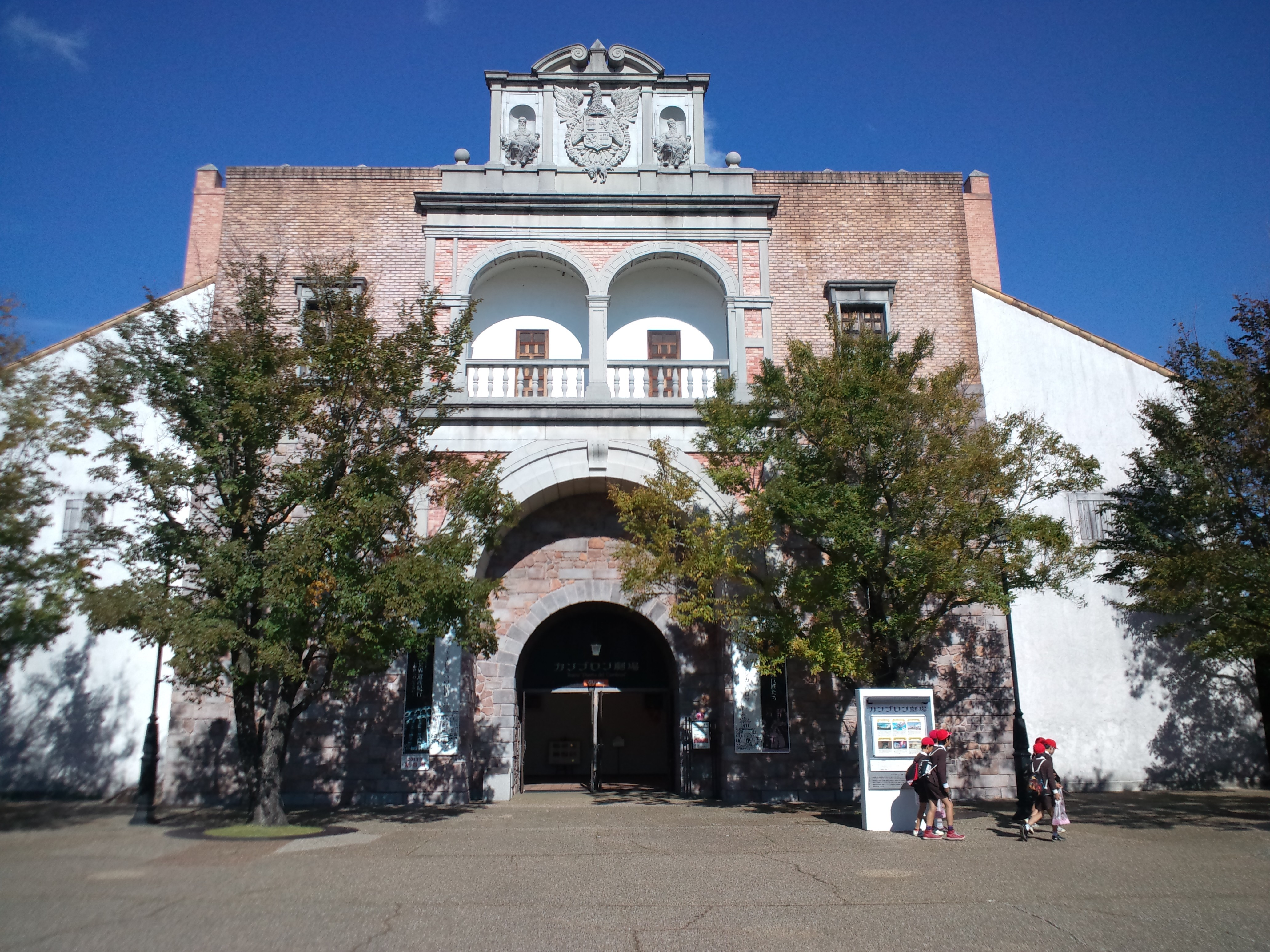 志摩スペイン村、パルケエスパーニャ カンブロン劇場